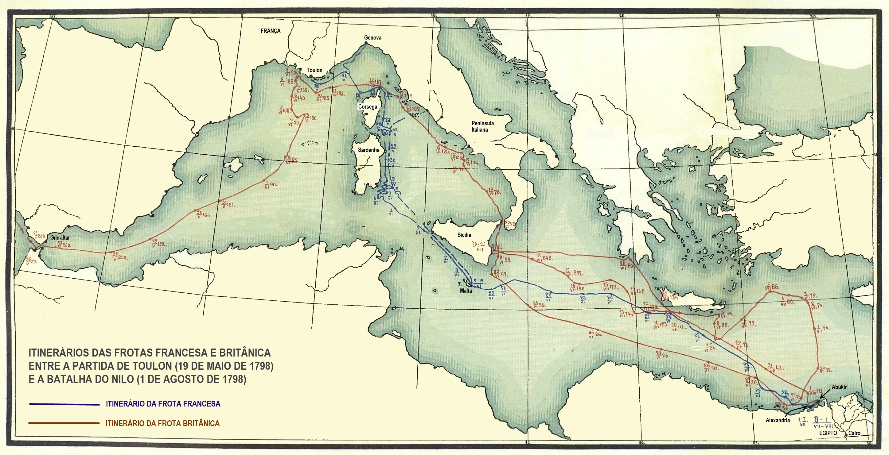 Mapa do Mediterrâneo em que se assinalam os movimentos das esquadras francesa e britânica durante a deslocação dos Franceses para o Egipto e até à Batalha do Nilo